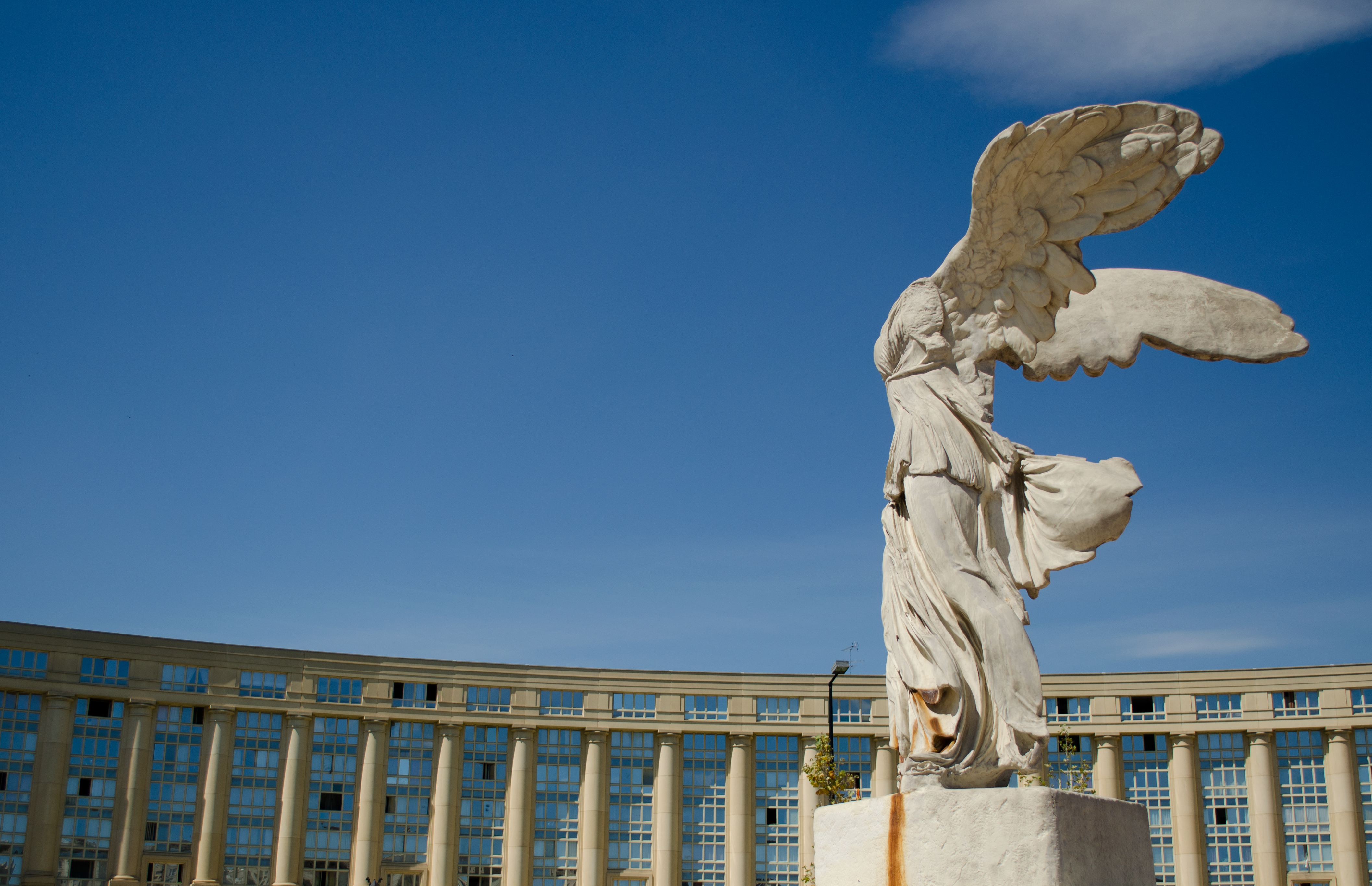 Copie de la victoire de samothrace présente dans le quartier Antigone à Montpellier.